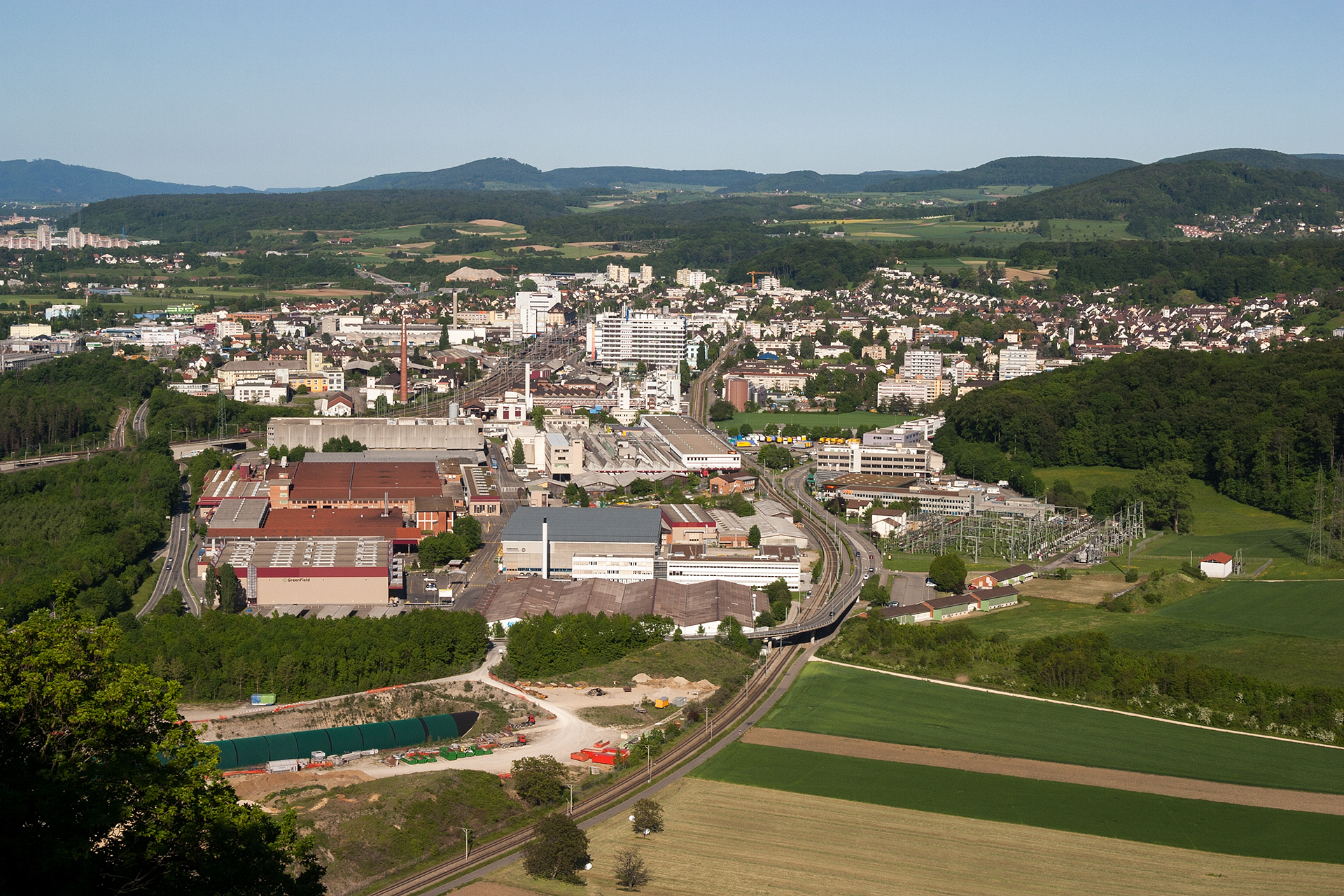 Blick aufs Industriequartier von Pratteln (BL)